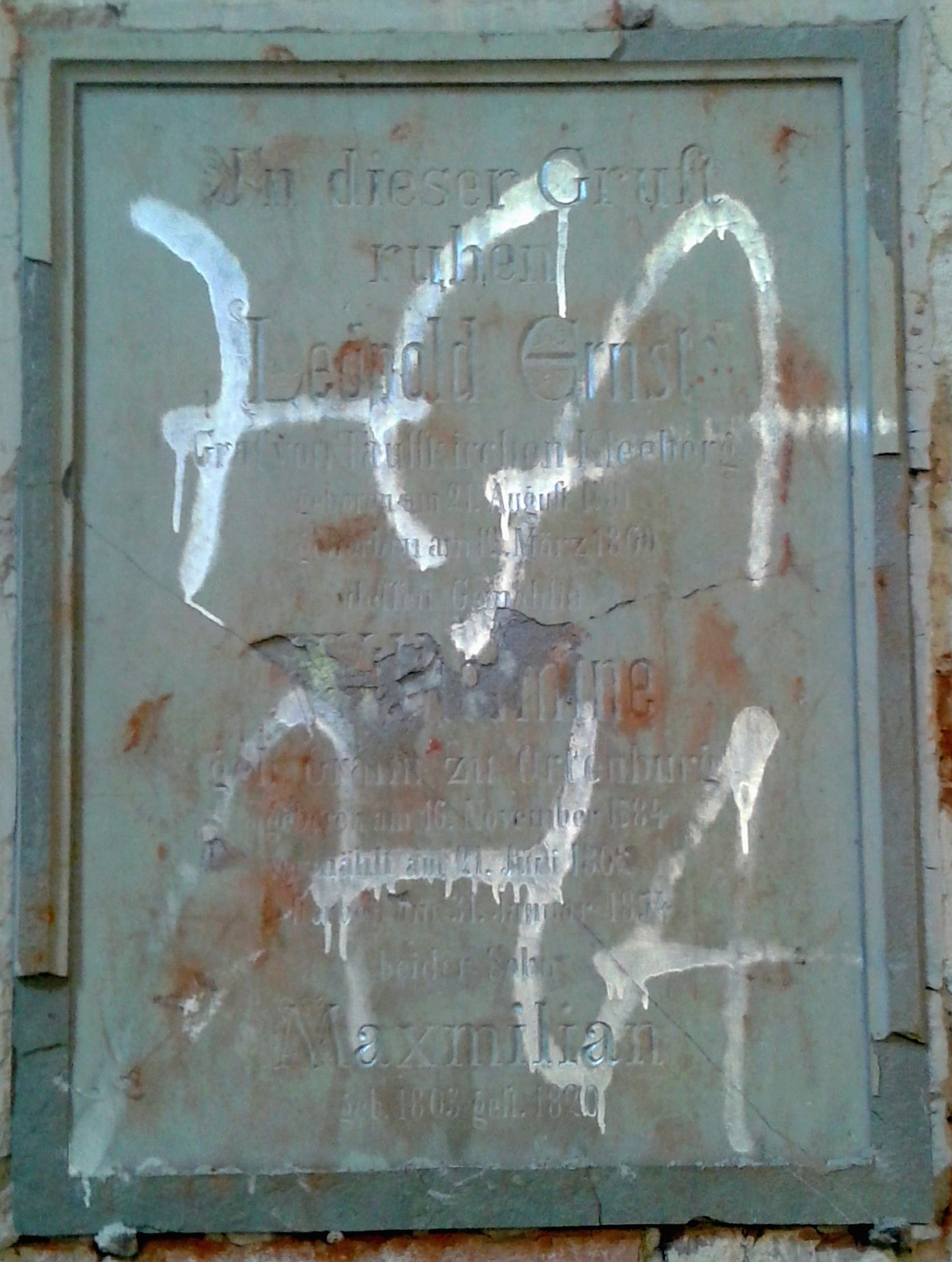 Epitaph der Grafen Tauffkirchen-Kleeberg in der ehemaligen Gruftkapelle dieser Familie in Trostling bei Ruhsdorf an der Rott, Niederbayern